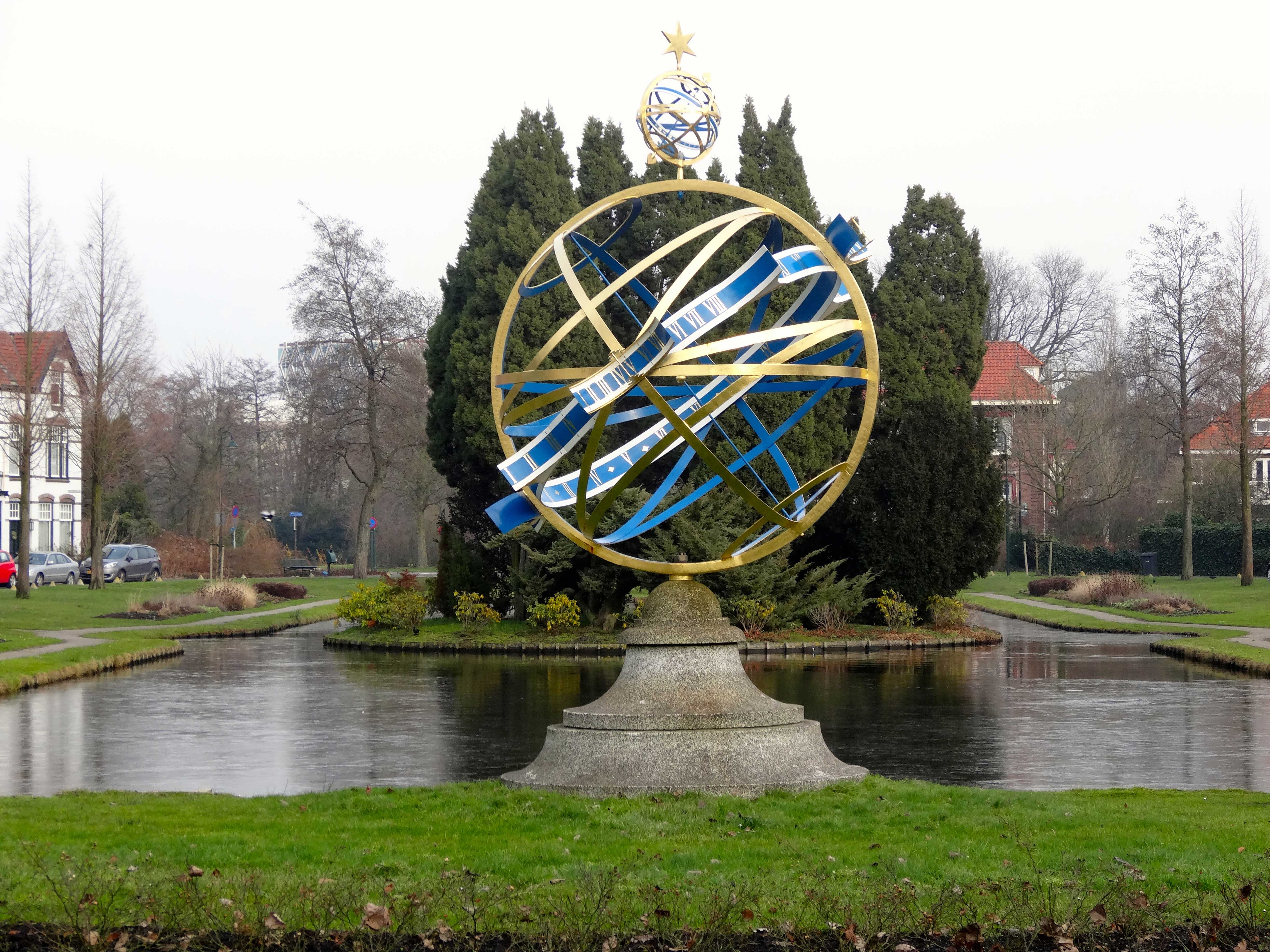 Zonnewijzer in het Nieuwe Park (Van Bergen IJzendoornpark) te Gouda, stond oorspronkelijk op het Albert Plesmanplein en is in 2014 in het park geplaatst